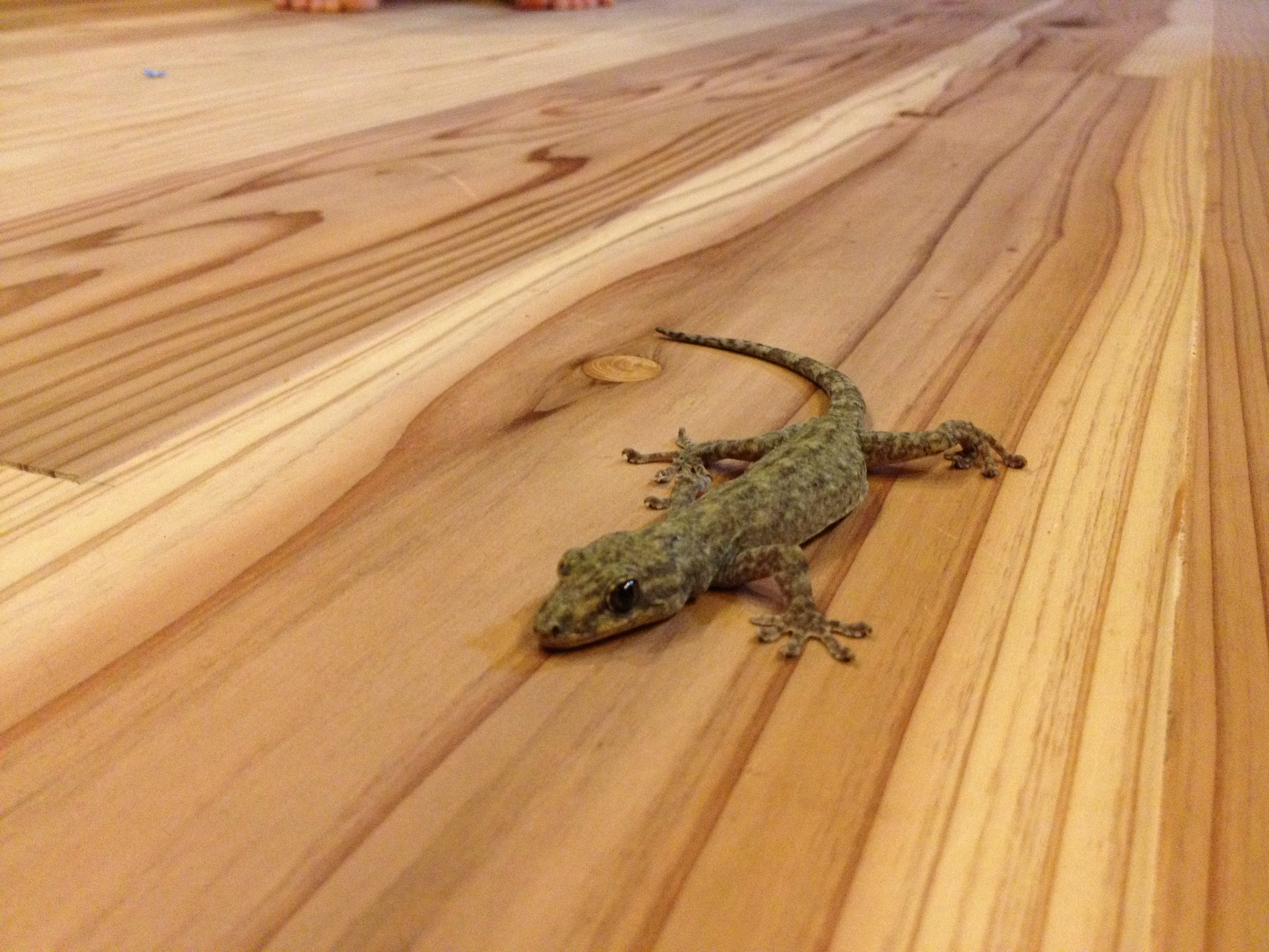 民家に侵入したヤクヤモリ